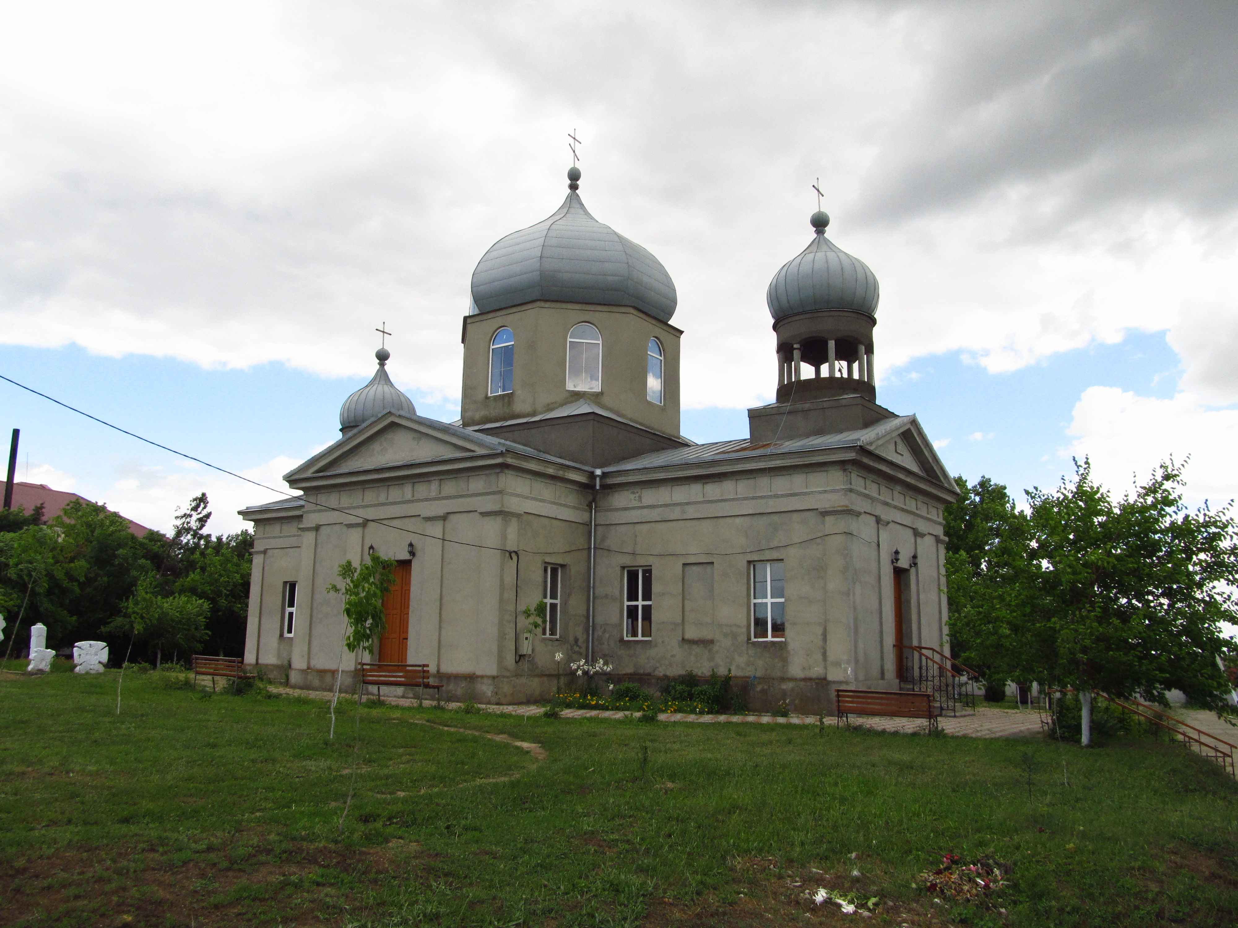 Троїцька церква, с. Баннівка, Леніна вул.